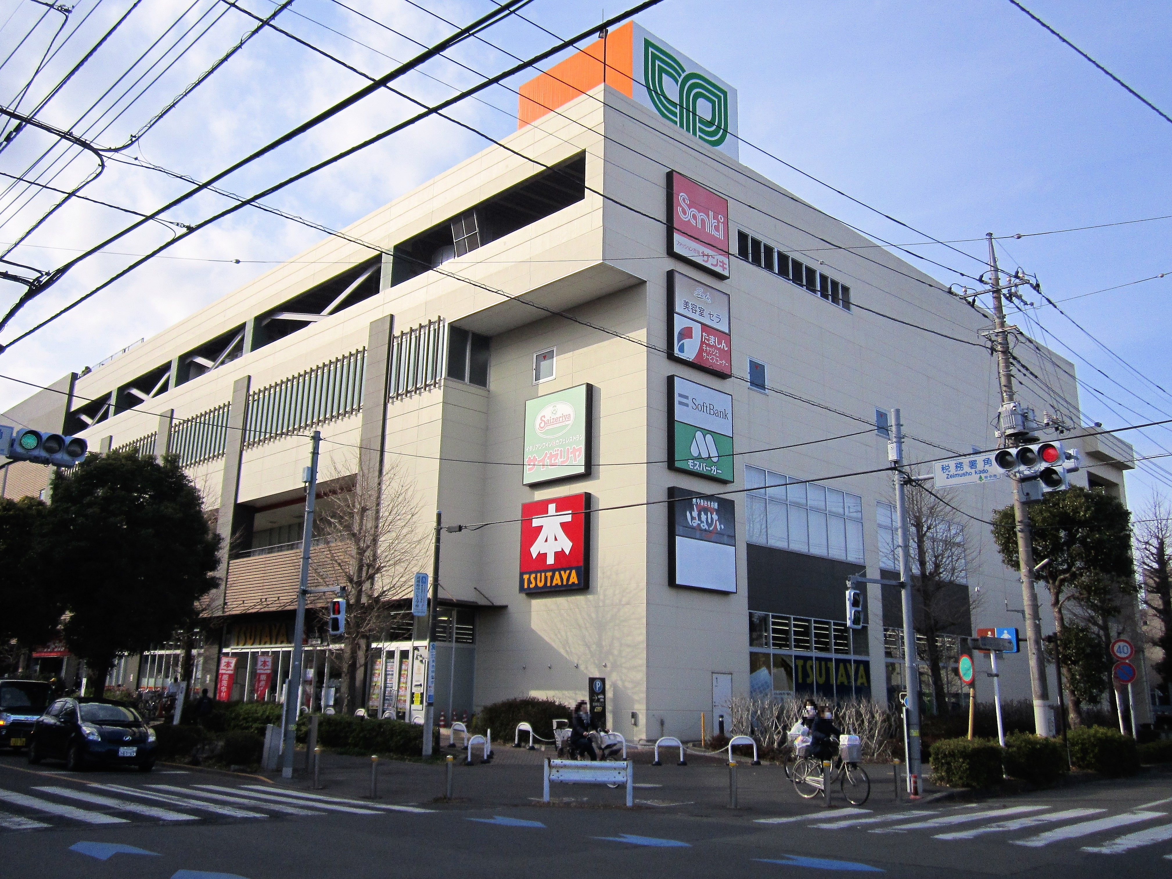 MINANO（府中市片町、サミットストア ミナノ分倍河原店などが入居） Canon PowerShot A2200